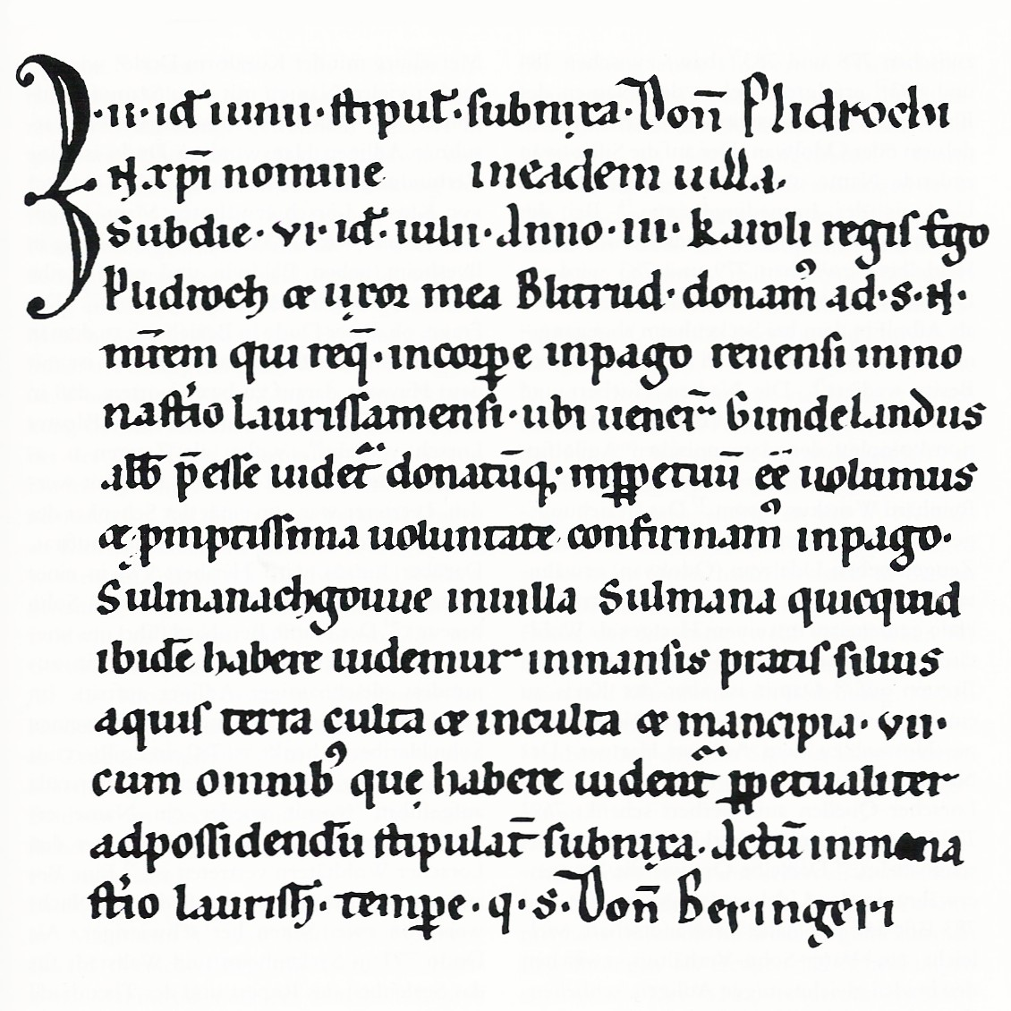 Neckarsulm wurde 771 erstmals im Lorscher Codex als "villa Sulmana" erwähnt. Aus dieser Urkunde geht hervor, dass ein Plidroch und seine Frau Blitrud dem Kloster Lorsch ihren gesamten Besitz in der "villa Sulmana" vermachen.